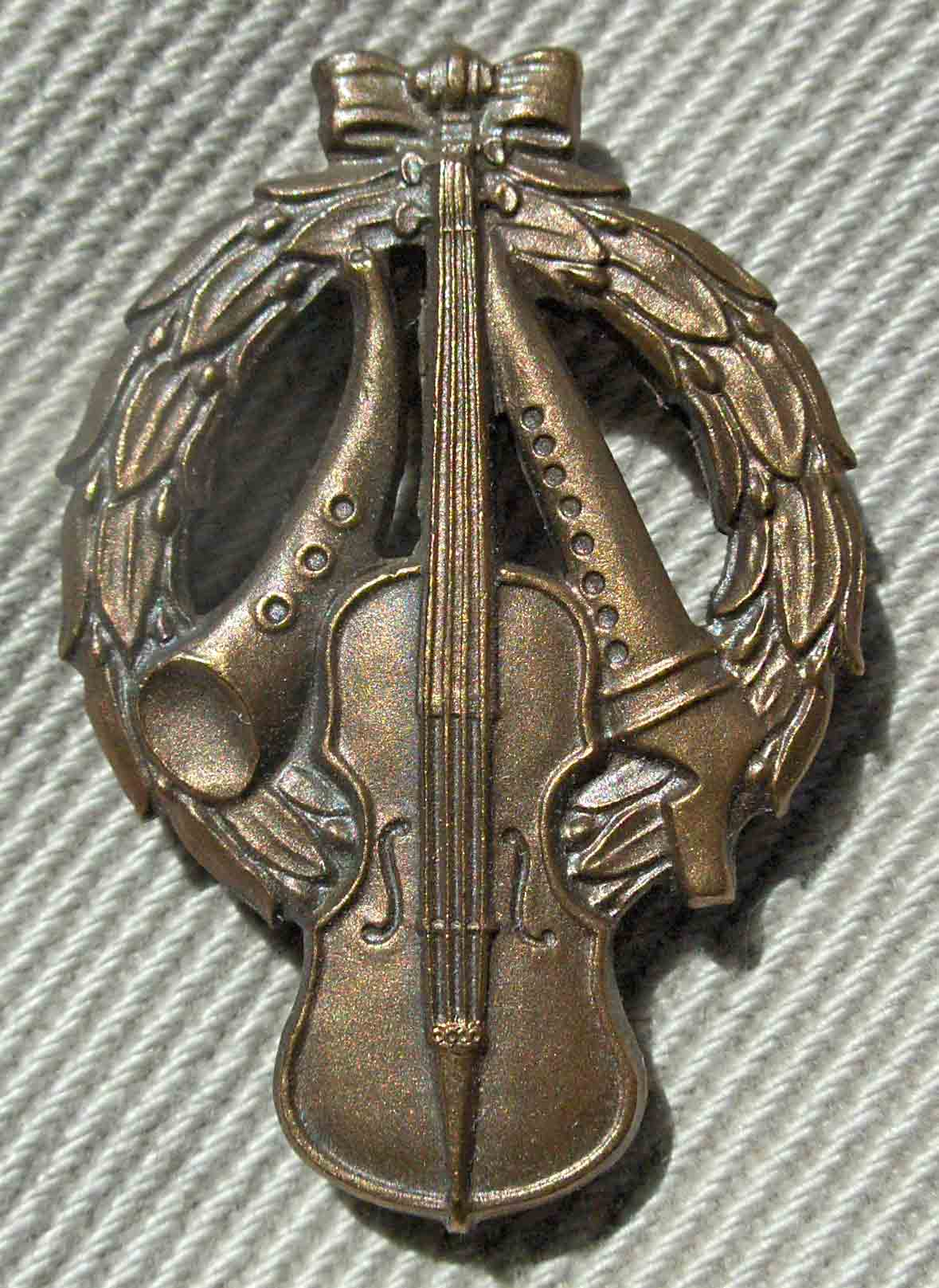 Bronze Zorn Badge Zornmärke brons